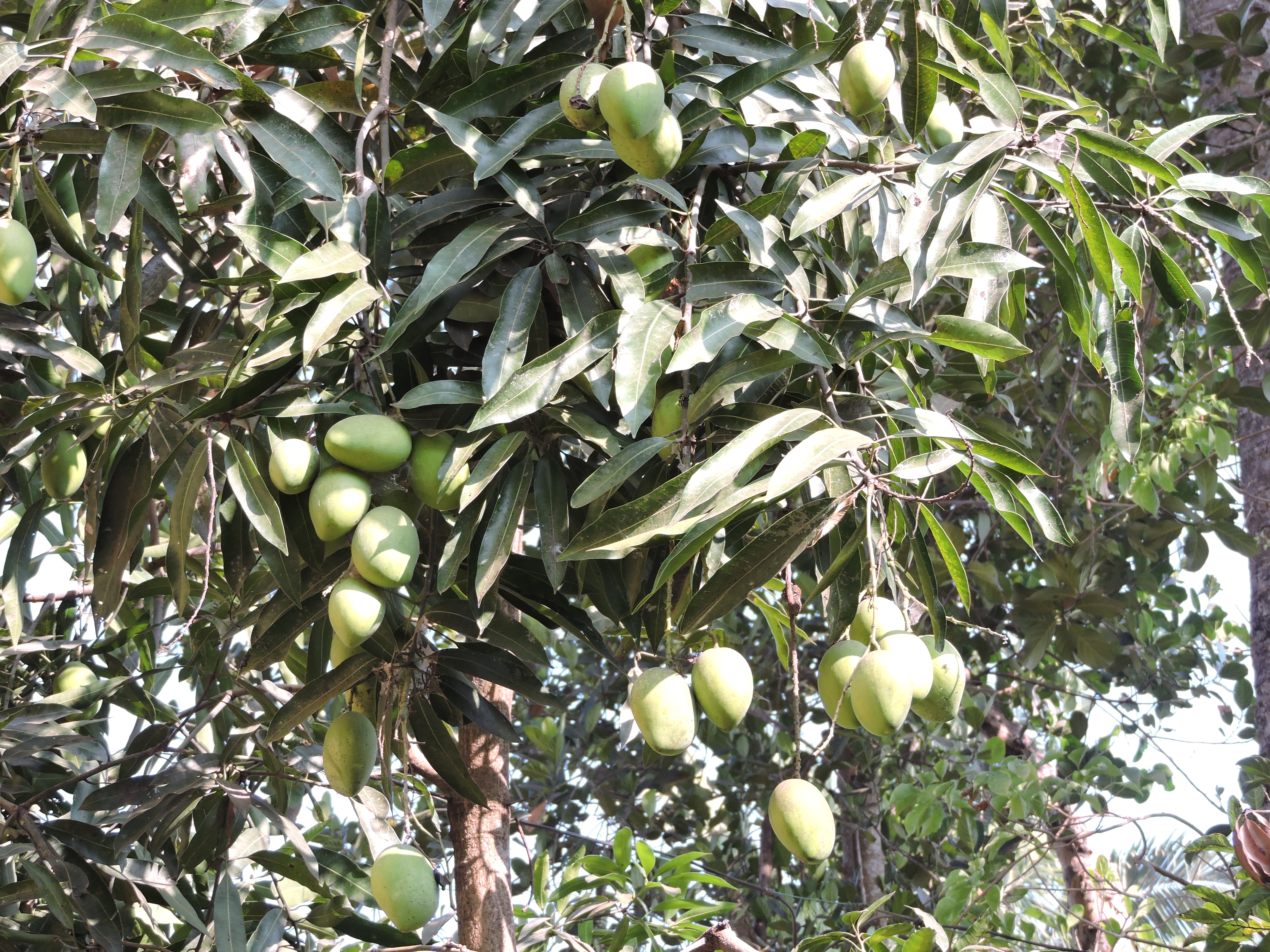 കായ്ച്ചു നിൽക്കുന്ന വെള്ളരി മാവ്